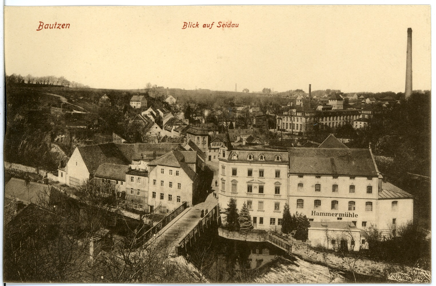 Bautzen; Blick auf Seidau, Hammermühle This postcard is from publisher Brück & Sohn in Meißen ( This postcard has a unique number 18777 and is available in a higher resolution at the publisher. This images was uploaded in a cooperation project between Wikipedians and the publisher.